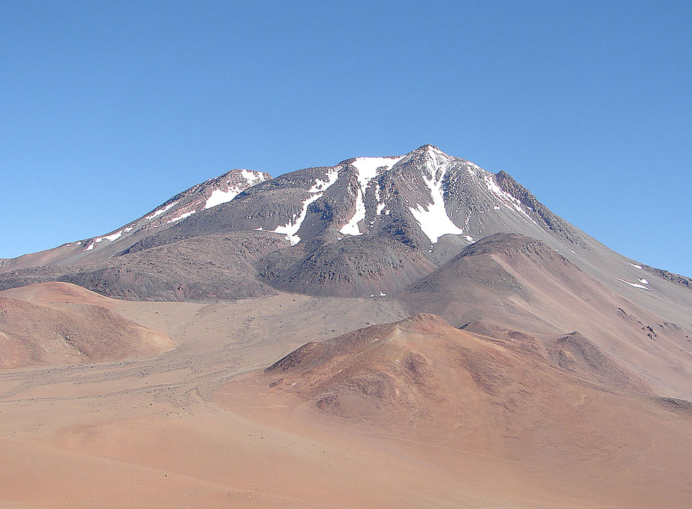 Llullaillaco del sur